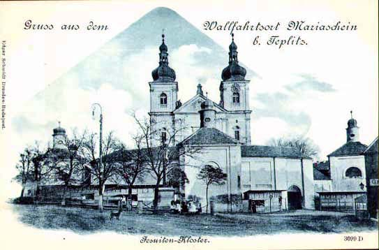 Mariaschein (Bohosudov) bei Teplitz, Jesuiten-Kloster um 1900